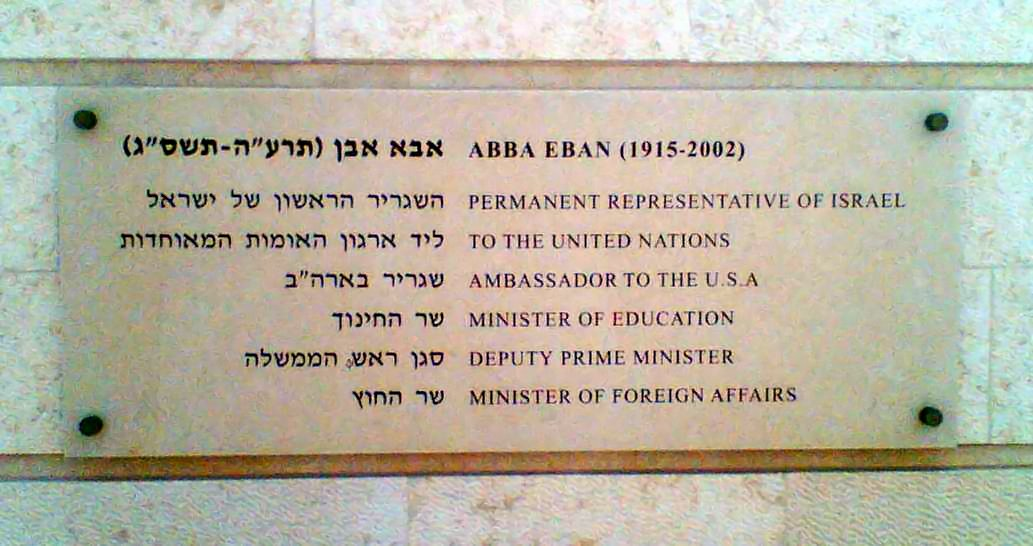 לוח לזכרו של אבא אבן, בכניסה לבניין משרד החוץ בירושלים